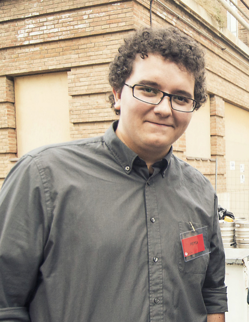 Facu Díaz.